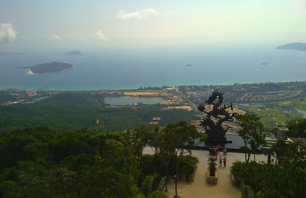 Yalong Bay, Hainan, China